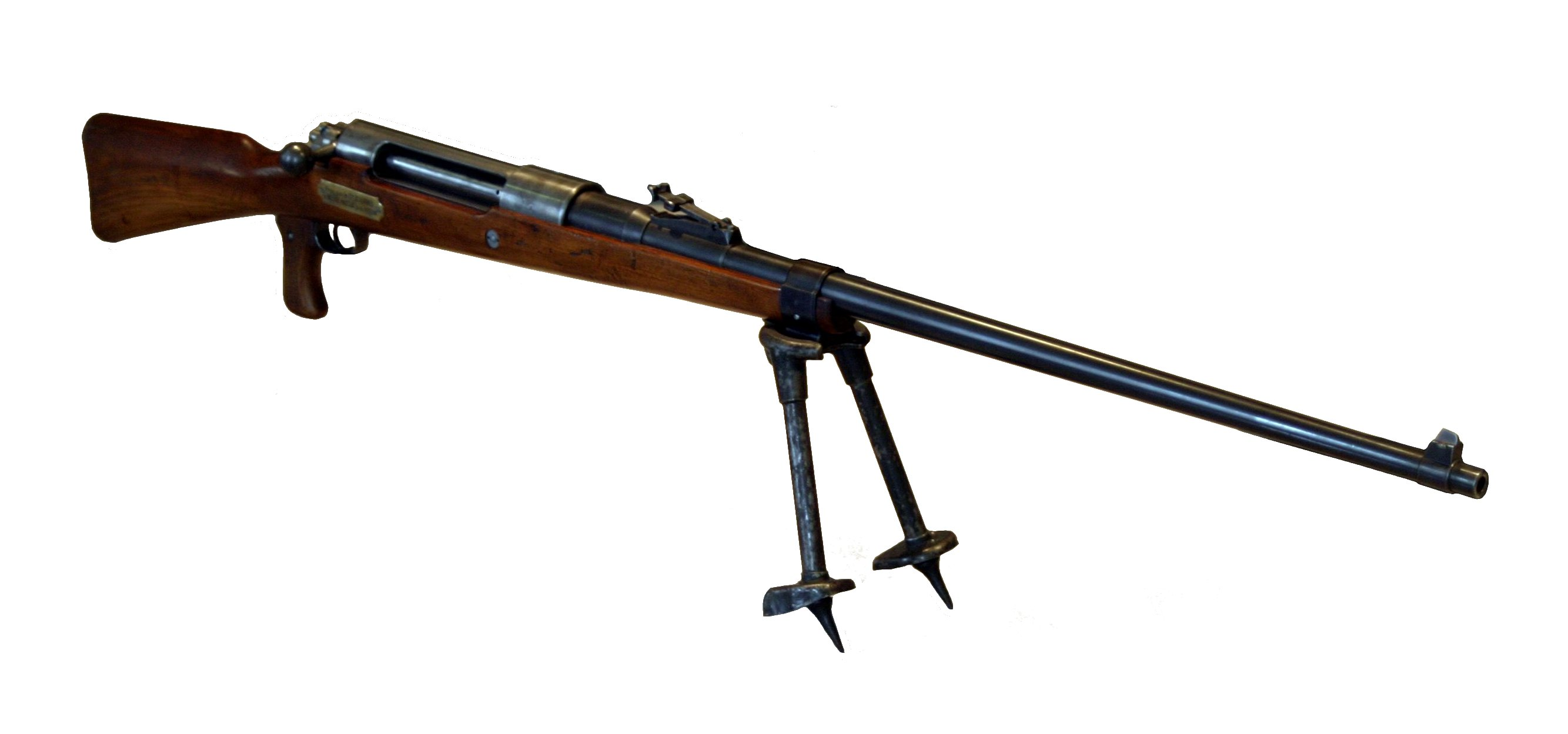 en:13.2 mm Rifle Anti-Tank (Mauser)